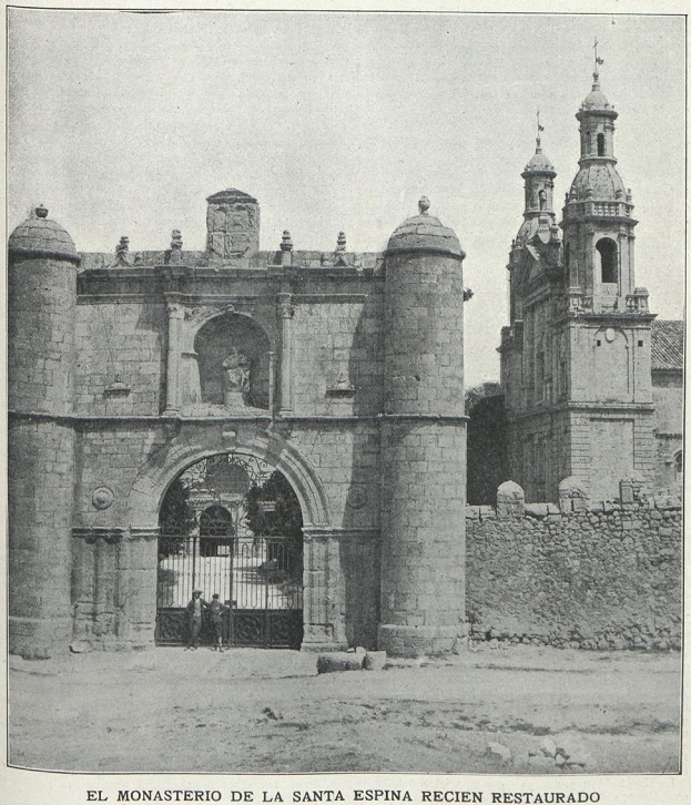 El monasterio de la Santa Espina, recién restaurado, en la revista española La Hormiga de Oro.